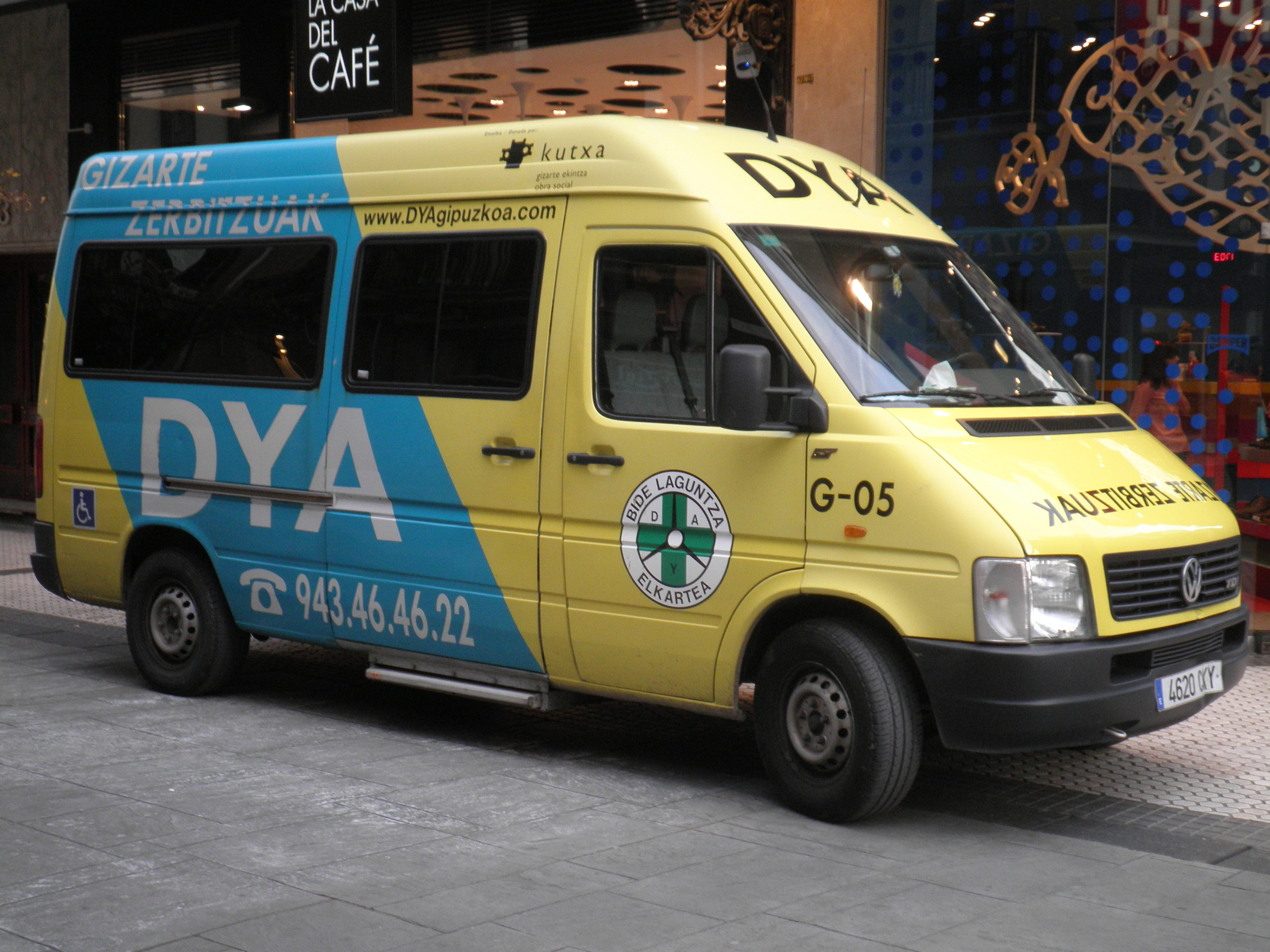 DYAren anbulantzia. Donostia.